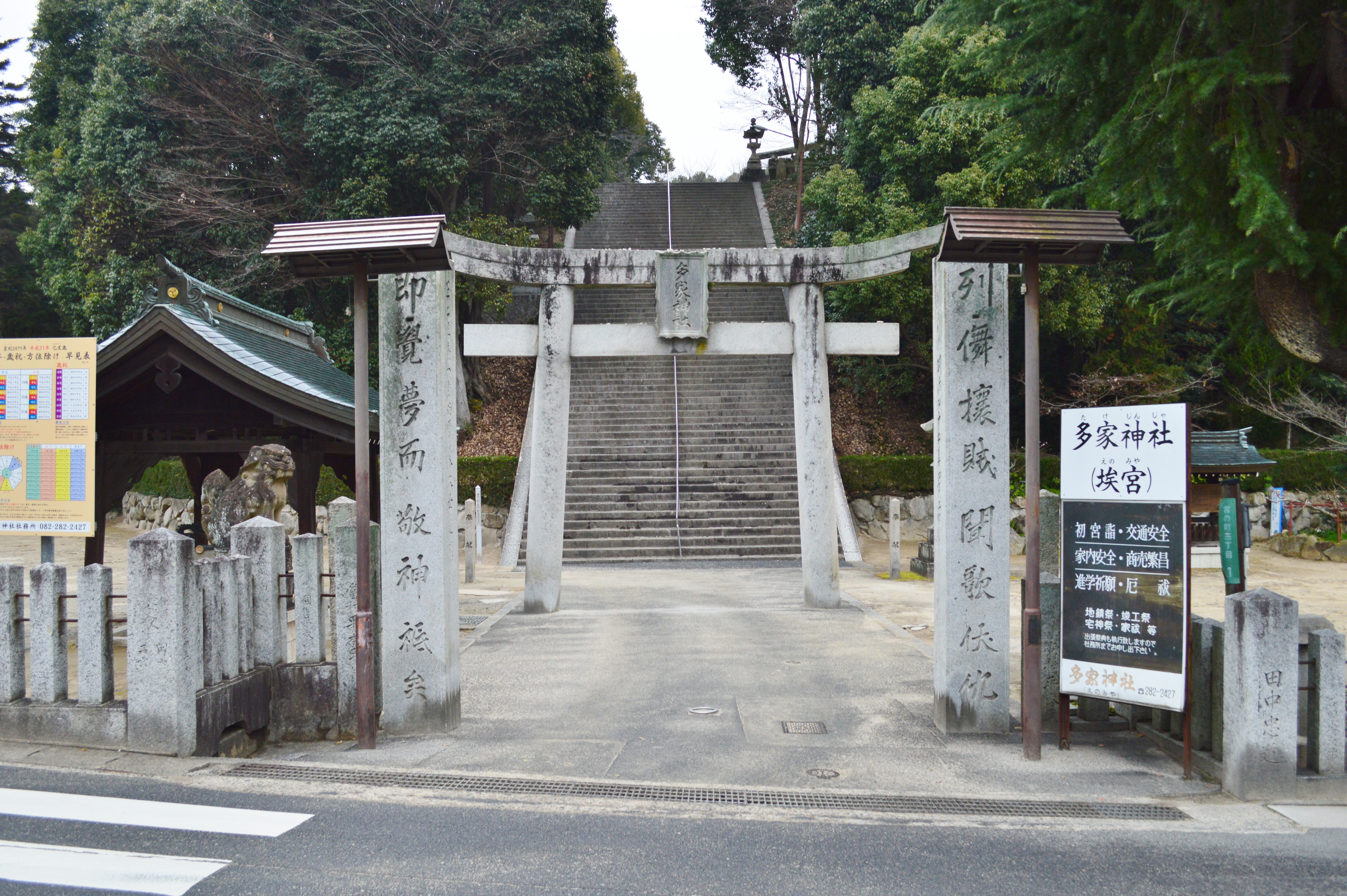 多家神社 鳥居 Nikon D3200